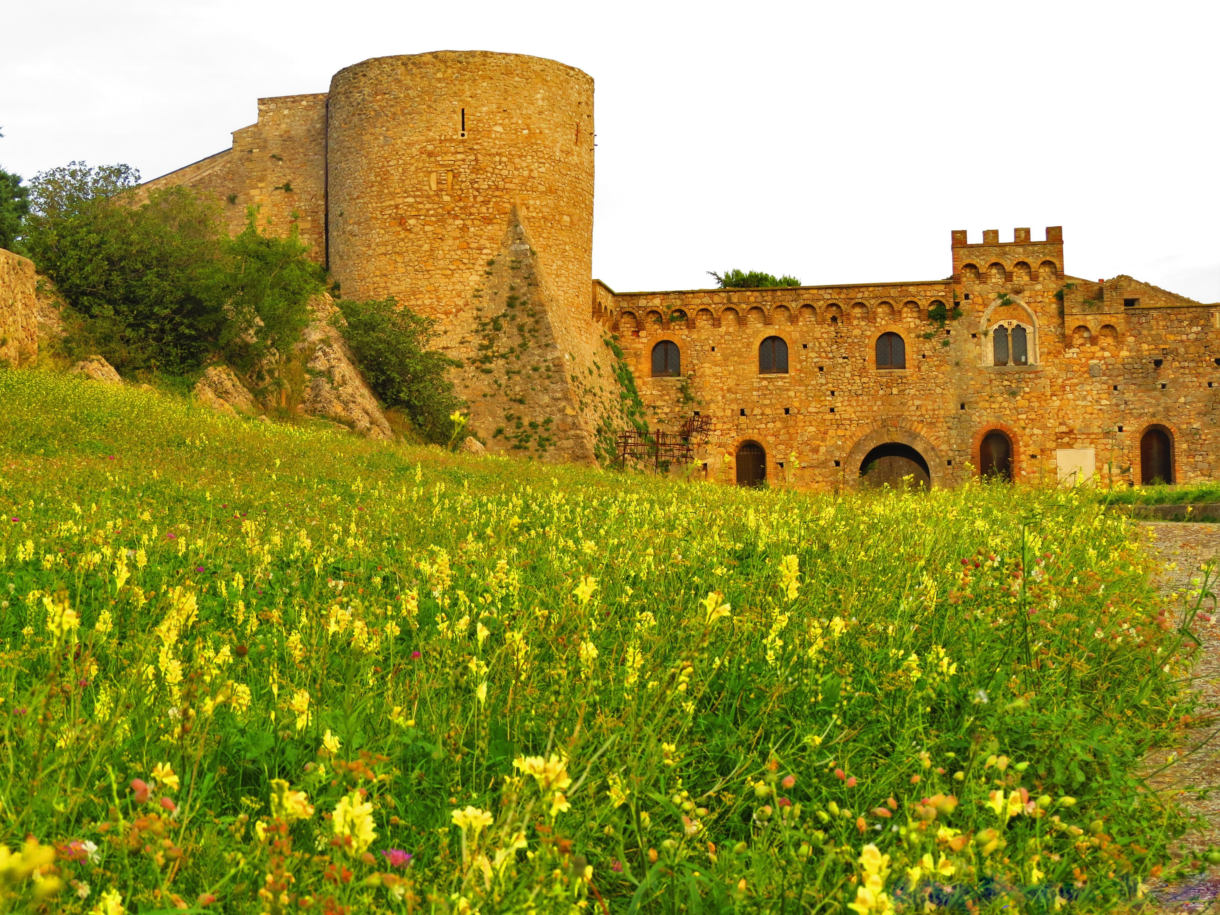 Bovino (FG)